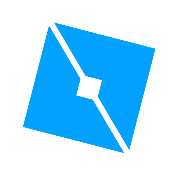 Logo actual de Roblox Studio.